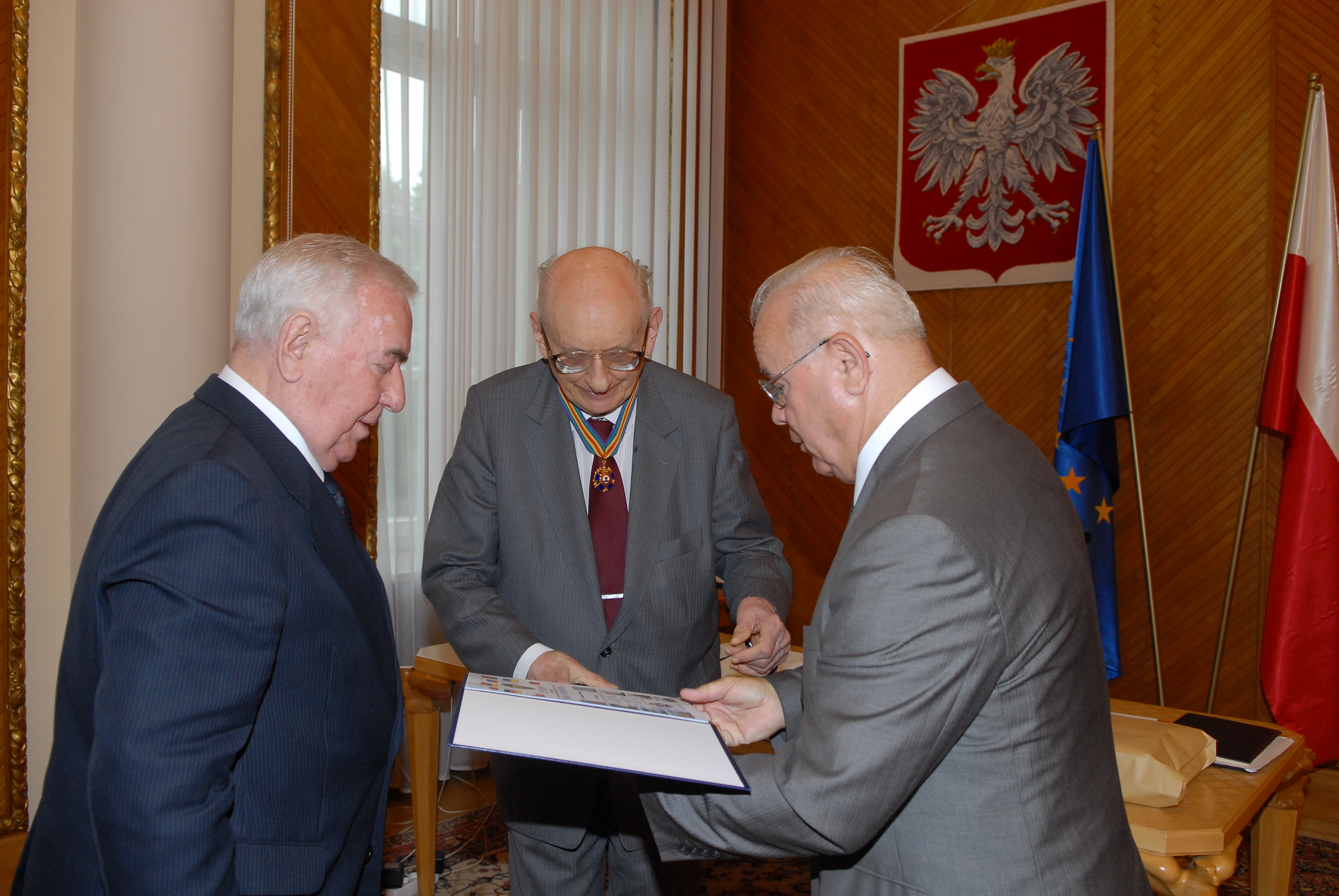 Uroczystość wręczenia Władysławowi Bartoszewskiemu Komandorii Missio Reconciliationis, Kancelaria Prezesa Rady Ministrów, Warszawa 6 lipca 2011 (stoją od lewej: kmdr dypl. Henryk Leopold Kalinowski – kanclerz, Władysław Bartoszewski, Tadeusz Kreps – przewodniczący Zarządu Krajowego Ogólnopolskiego Stowarzyszenia Społecznego "Misja Pojednania")